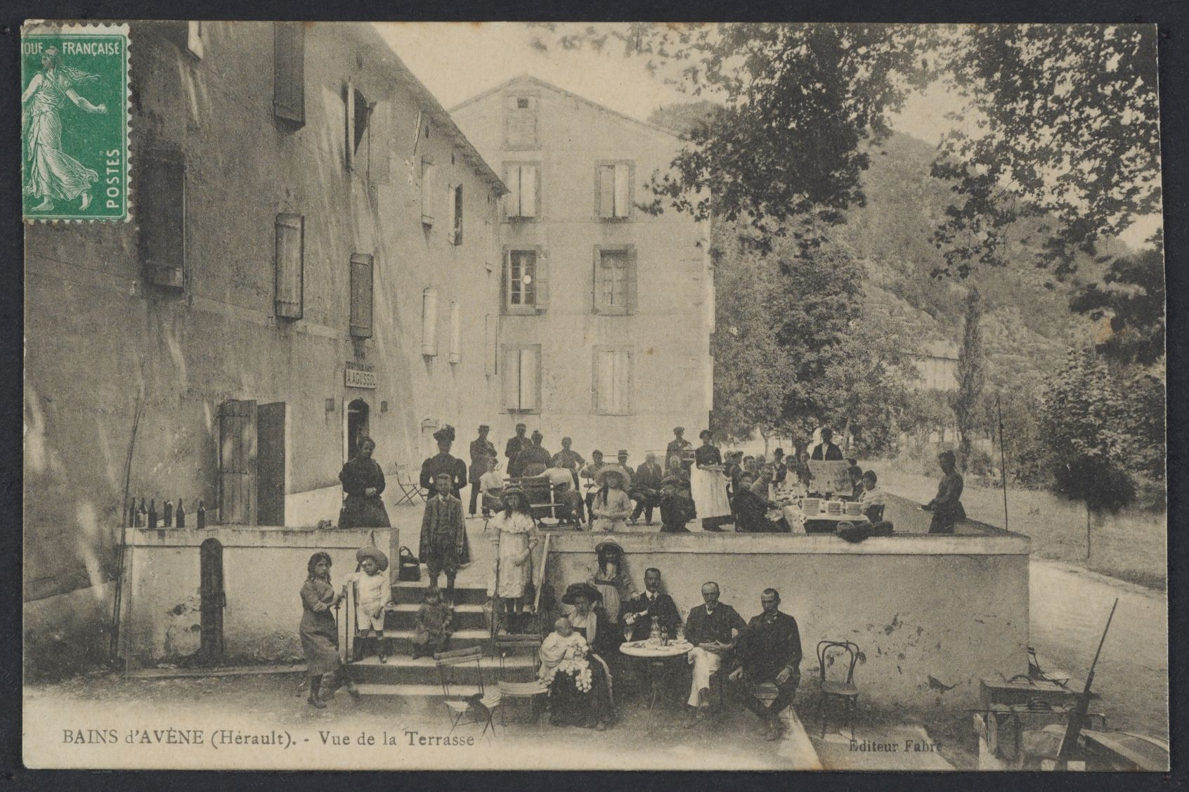 Bains-d'Avène. - Vue de la terrasse : carte postale